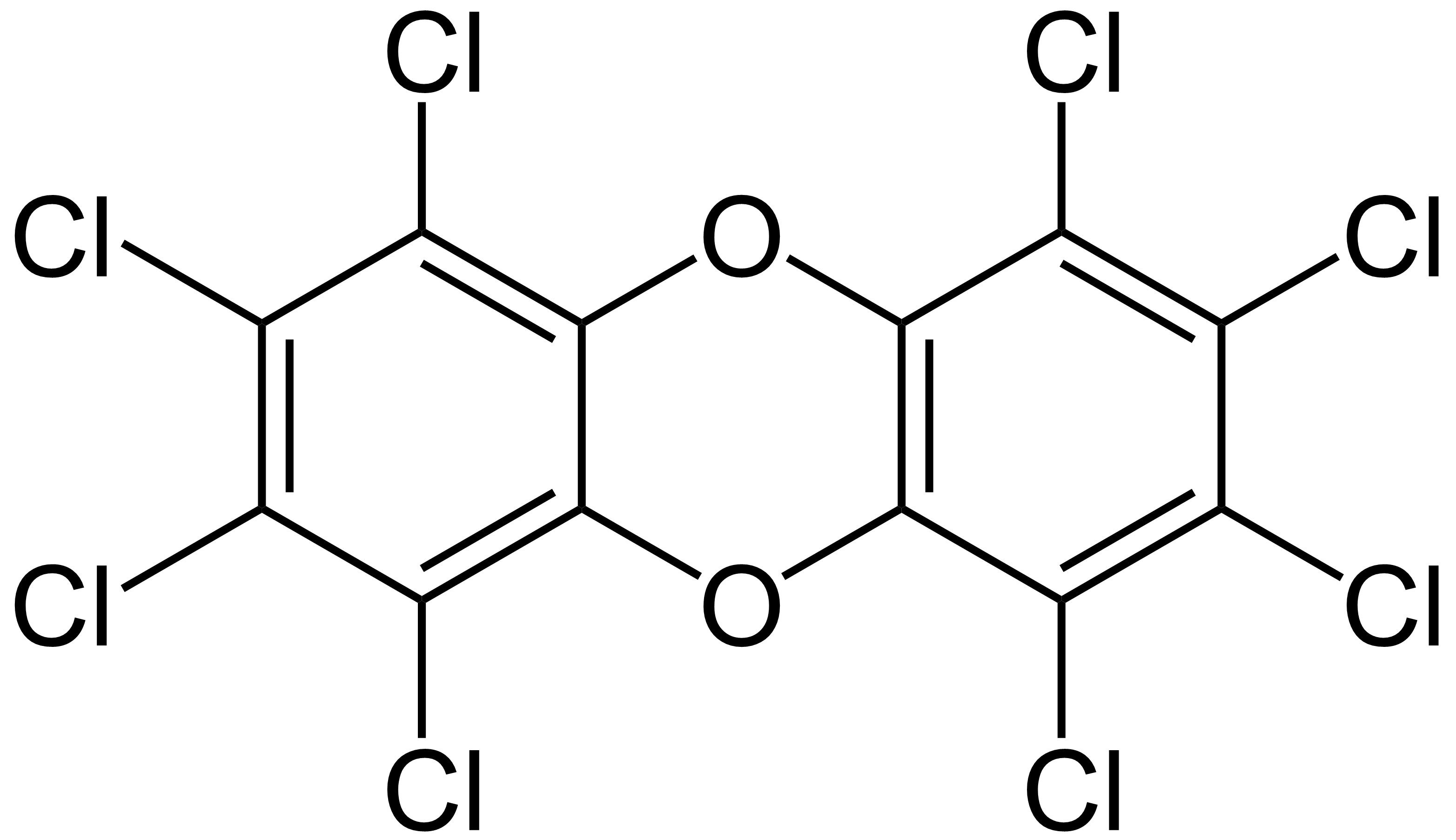 chemical structure of octachlorodibenzodioxin